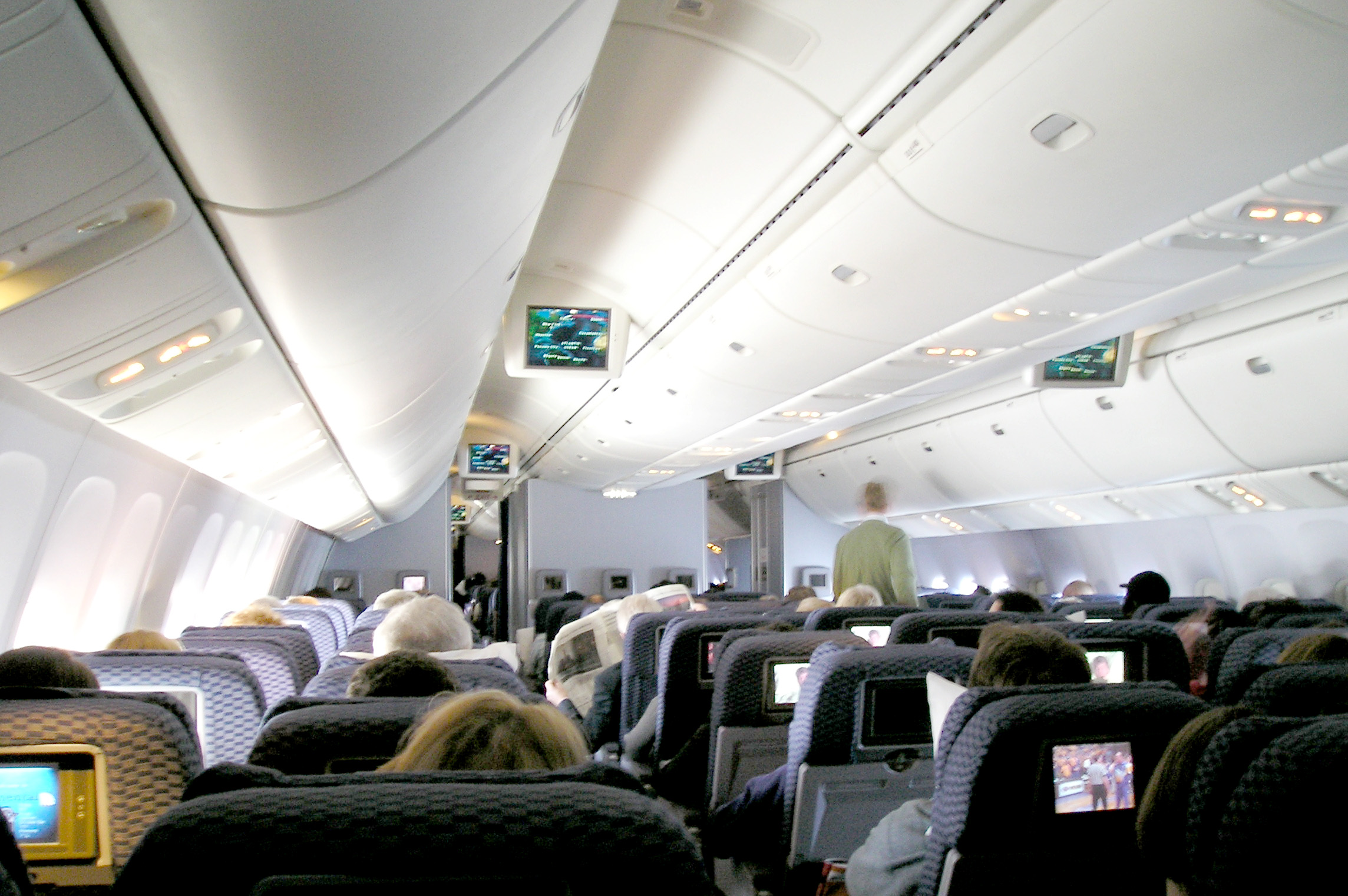 Zelfgemaakte foto Amsterdam-Newark, 20 december 2005 Edited version of original photo: PC200007.JPG